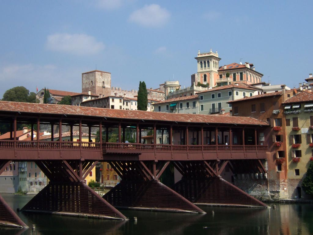 Bassano del Grappa, Ponte degli Alpini